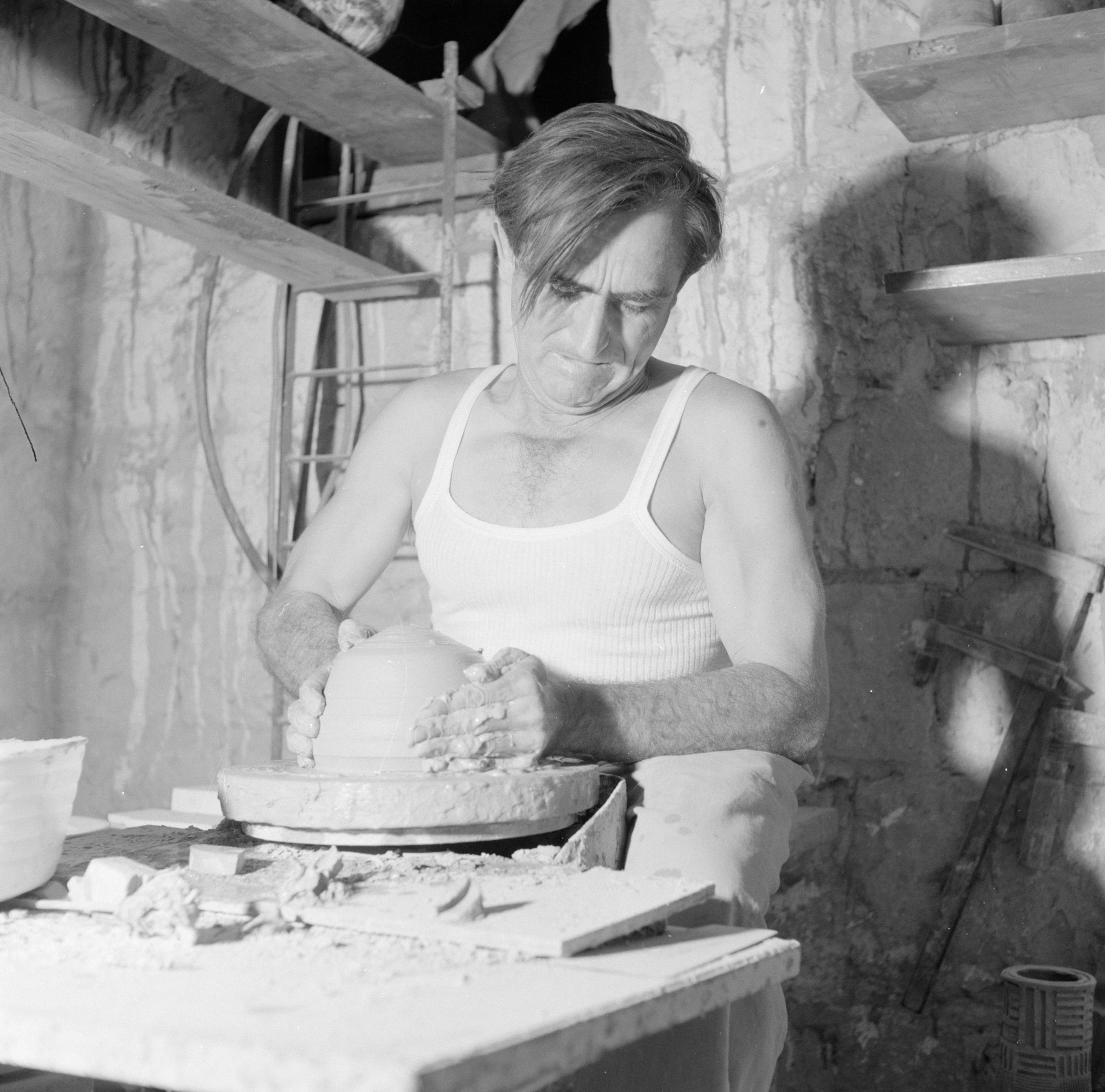 Collectie / Archief : Fotocollectie Van de Poll Reportage / Serie : Israël 1964-1965. Ein Hod Beschrijving : Kunstenaarskolonie Ein Hod. Pottenbakker draait een stuk aardewerk Annotatie : Ein Hod is een kunstenaarskolonie ten zuiden van de berg Carmel. Opgericht door de Dada-kunstenaar Marcel Janco. Datum : 1964 Locatie : Ein Hod, Israël Trefwoorden : aardewerk, keramiek, kunstenaarskolonies, pottenbakken Fotograaf : Poll, Willem van de, [onbekend] Auteursrechthebbende : Nationaal Archief Materiaalsoort : Negatief (zwart/wit) Nummer archiefinventaris : bekijk toegang 2.24.14.02 Bestanddeelnummer : 255-2776